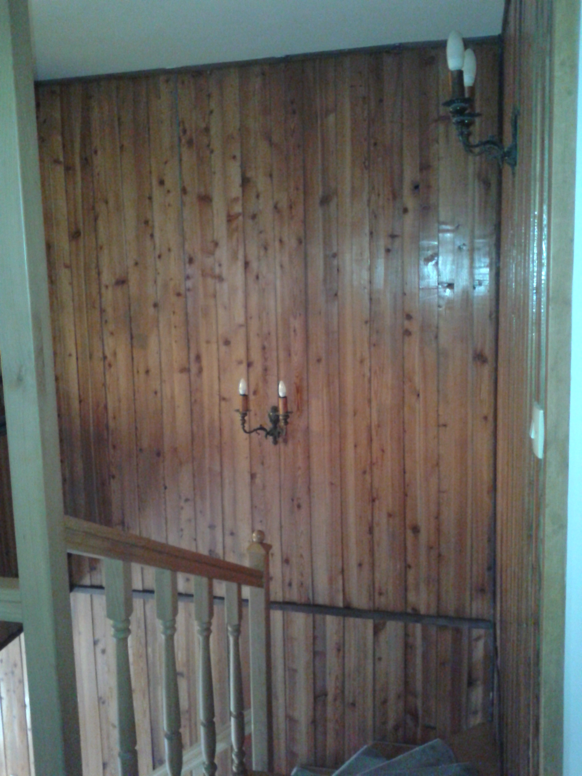 Boazeria modrzewiowa w domu jednorodzinnym